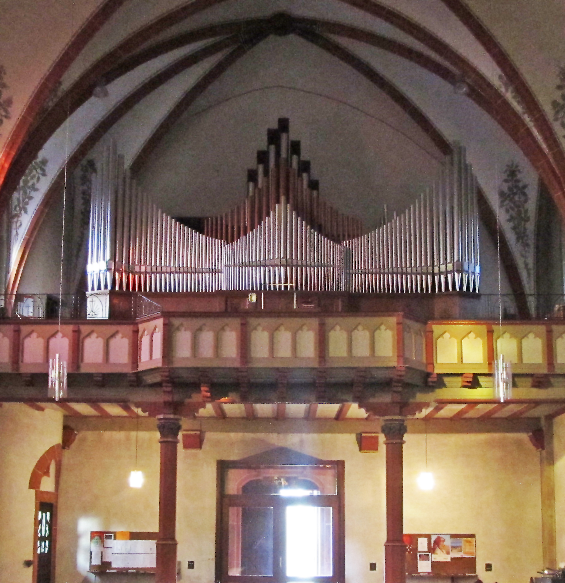 Orgelprospekt der katholischen Pfarrkirche Mariä Himmelfahrt in Geislautern, einem Stadtteil von Völklingen, Saarland